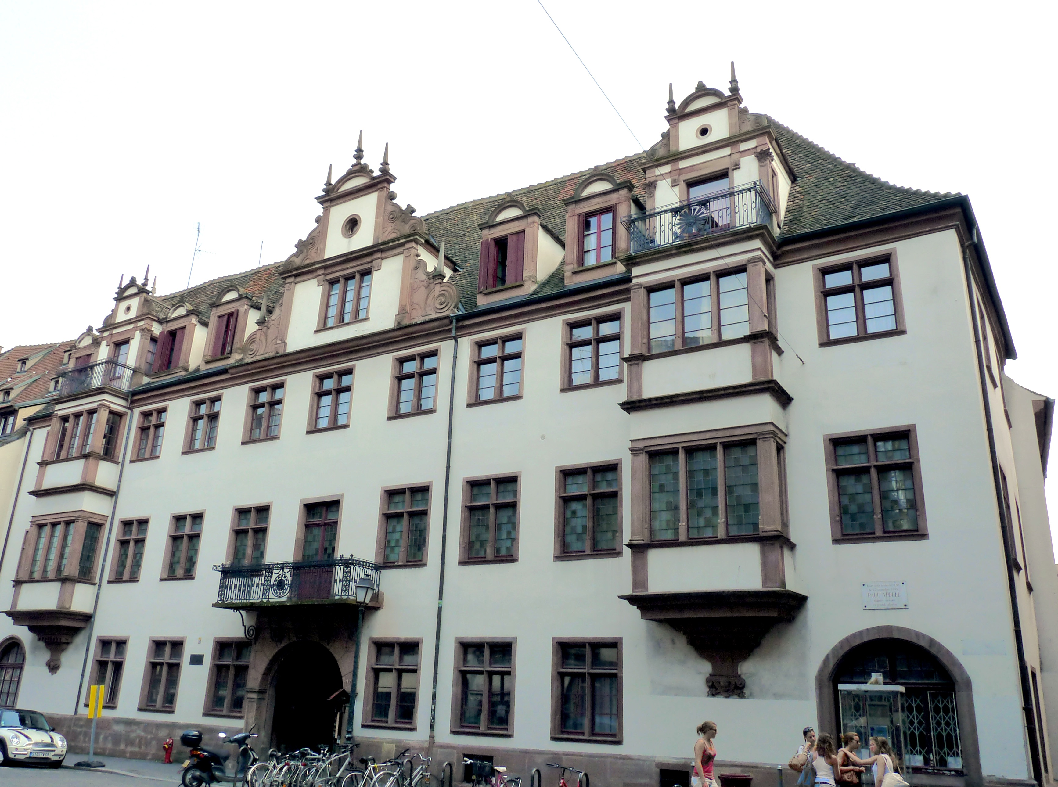 Maison natale de Paul Appell (place Saint-Etienne, Strasbourg)